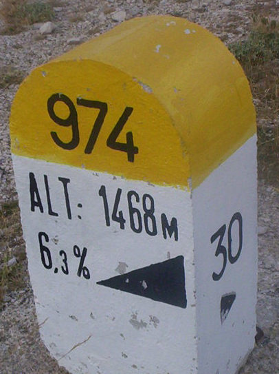 Borne kilométrique du Mont Ventoux